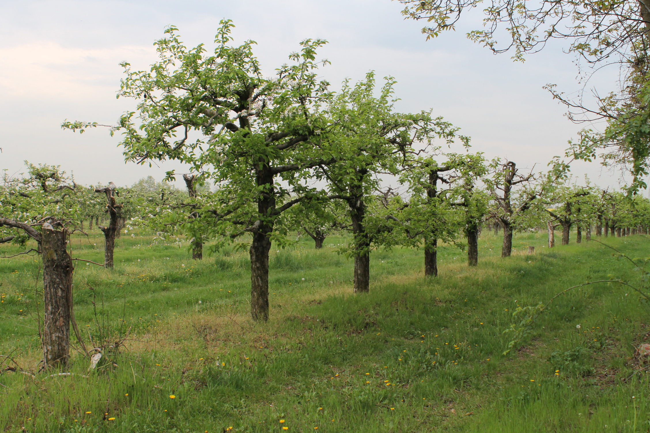 jabloňový sad, nejméně čtyřicet let starý, Brno Bohunice, Česká republika